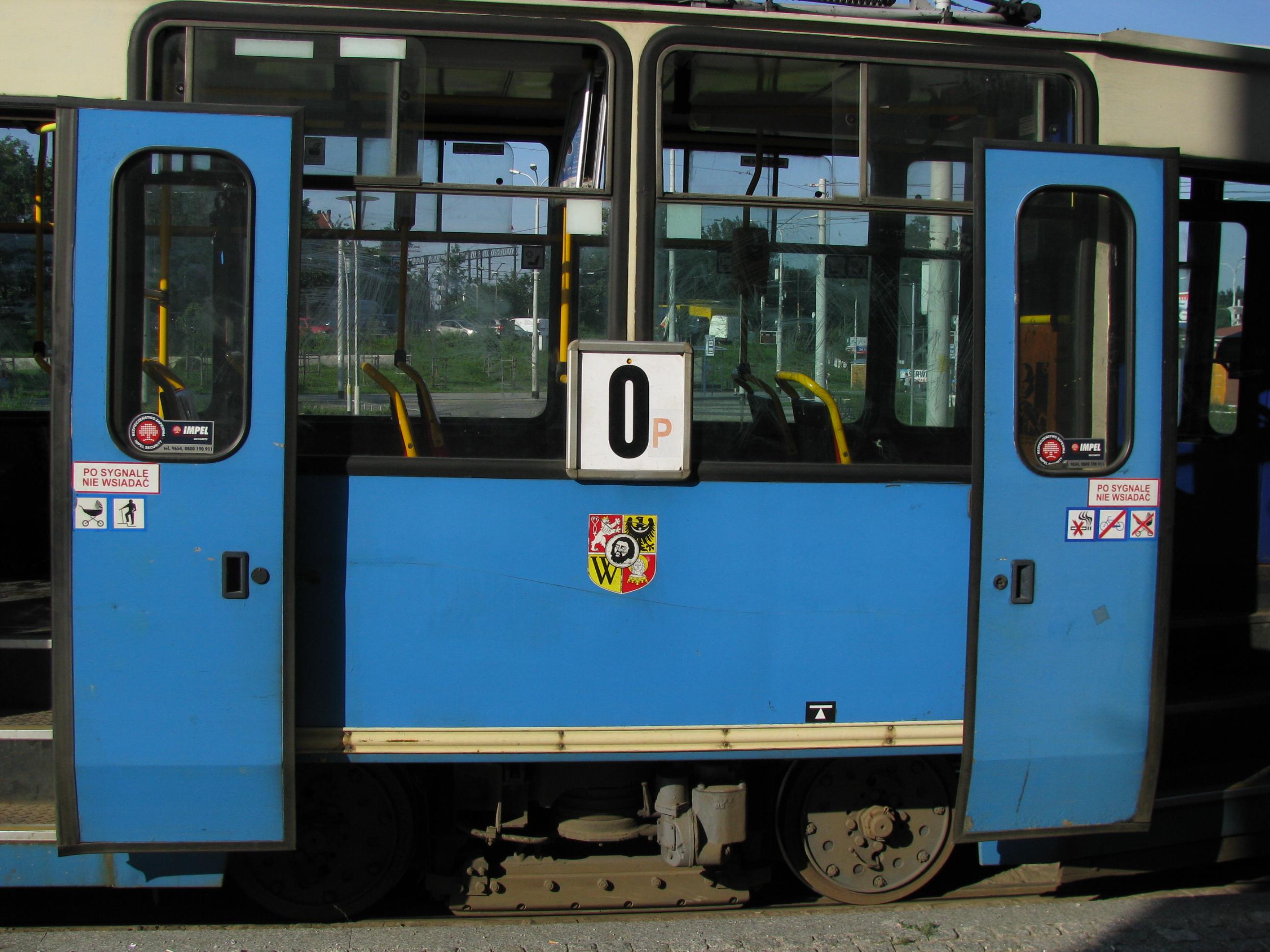 Tramwaj 105Na na linii 0 we Wrocławiu.